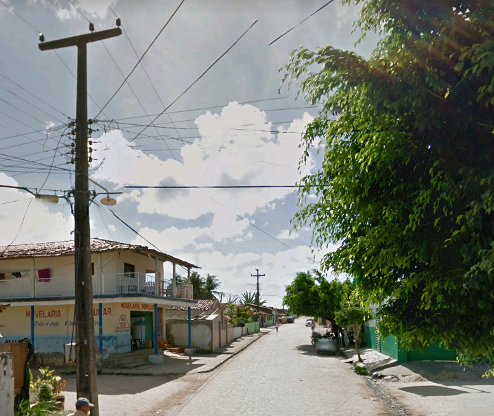 Imagem da Rua Borges Trindade em Lerolândia